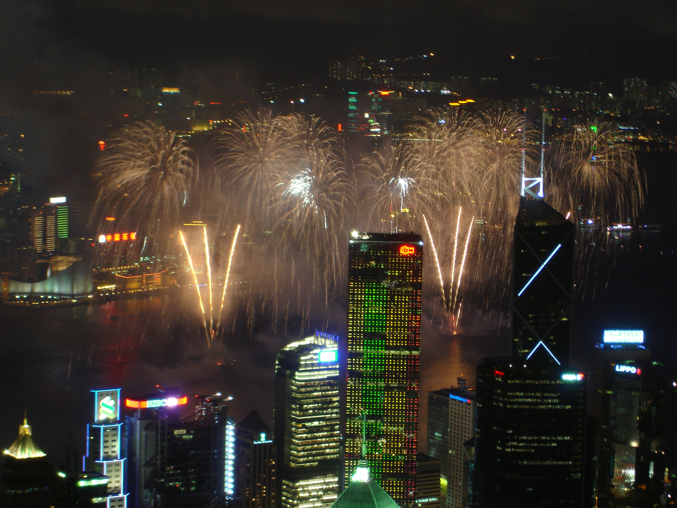 回歸十年紀念煙花匯演